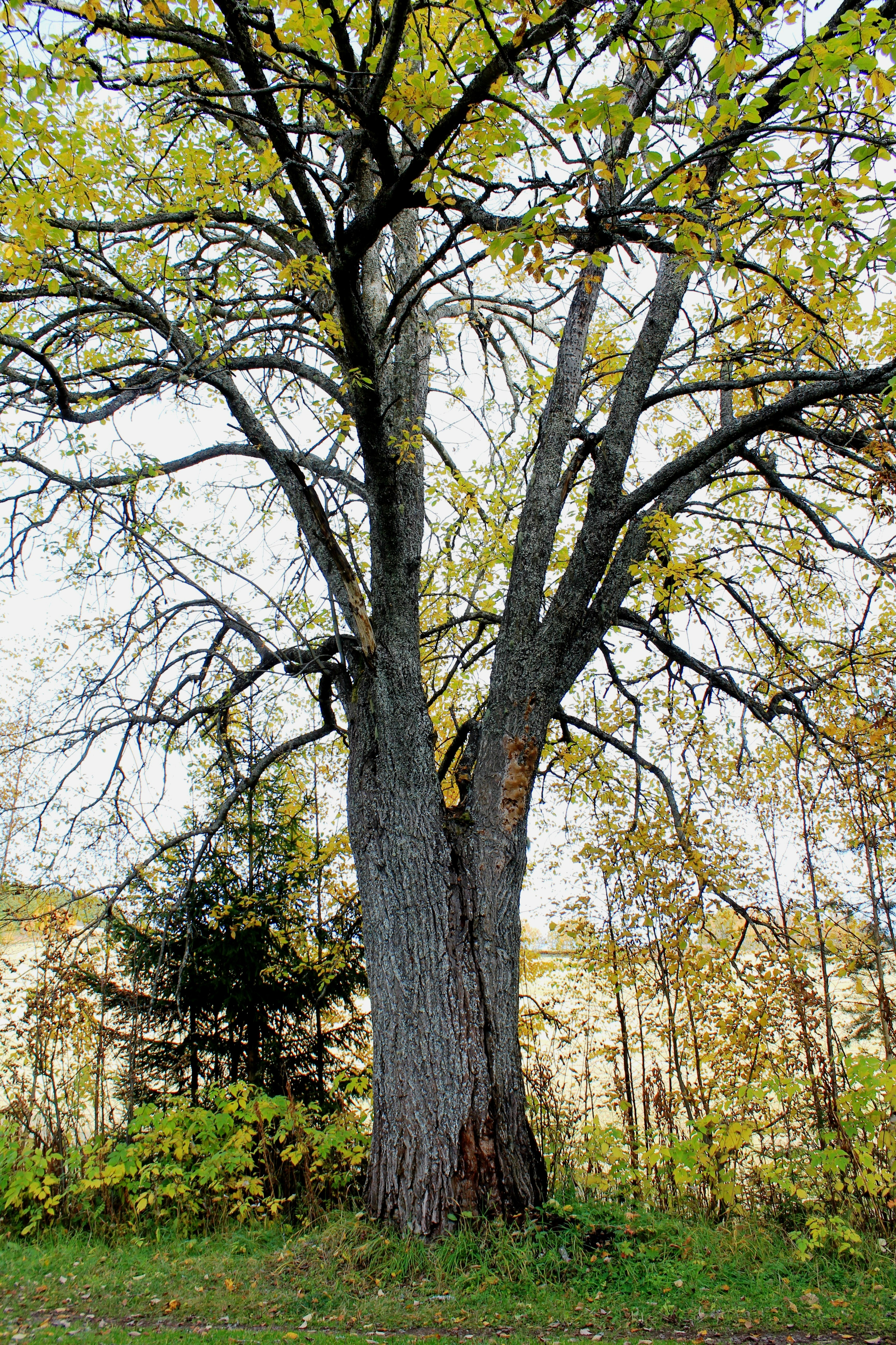 Grov selje ved Eiktunet friluftsmuseum.